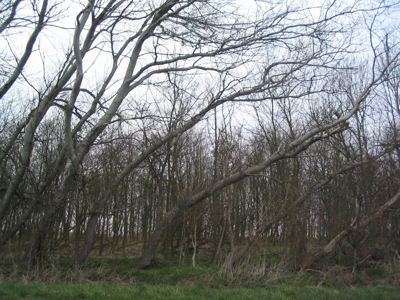 Trees, Büsum